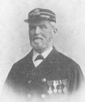 Egbert van Hoepen, 100 jaar oude copyrightvrije foto